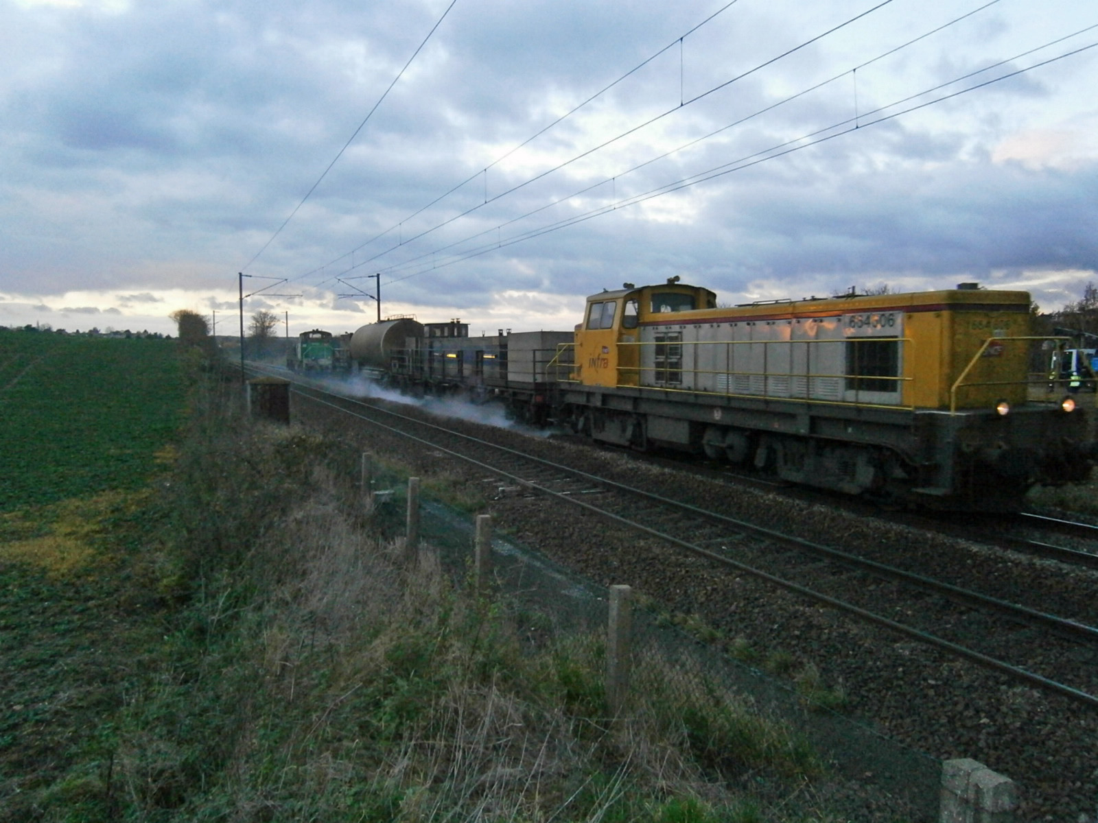 Une BB 64600 et ses wagons nettoyeurs de voies roule sur la ligne de Saint-Cyr à Surdon, à Saint-Germain-de-la-Grange (78).